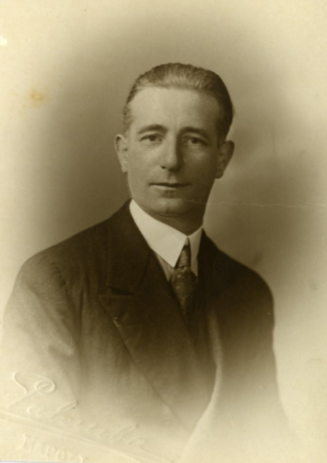 Foto di Dionysio Typaldos